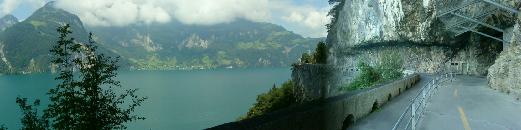 Fahrrad-/Fussweg am Vierwaldstättersee zwischen Ingenbohl und Altdorf